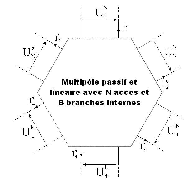 Schéma électrique explicatif.